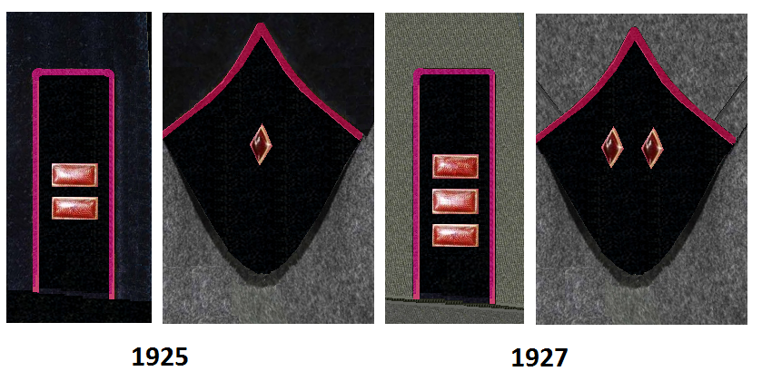 ТОГПУ341